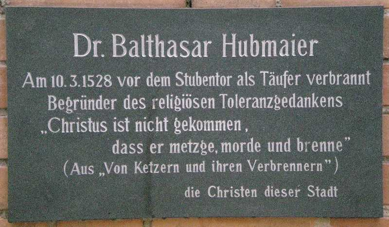 Gedenktafel für Balthasar Hubmaier (oder Hubmayr) an den Resten des Stubentores am Dr.-Karl-Lueger-Platz im 1. Wiener Gemeindebezirk